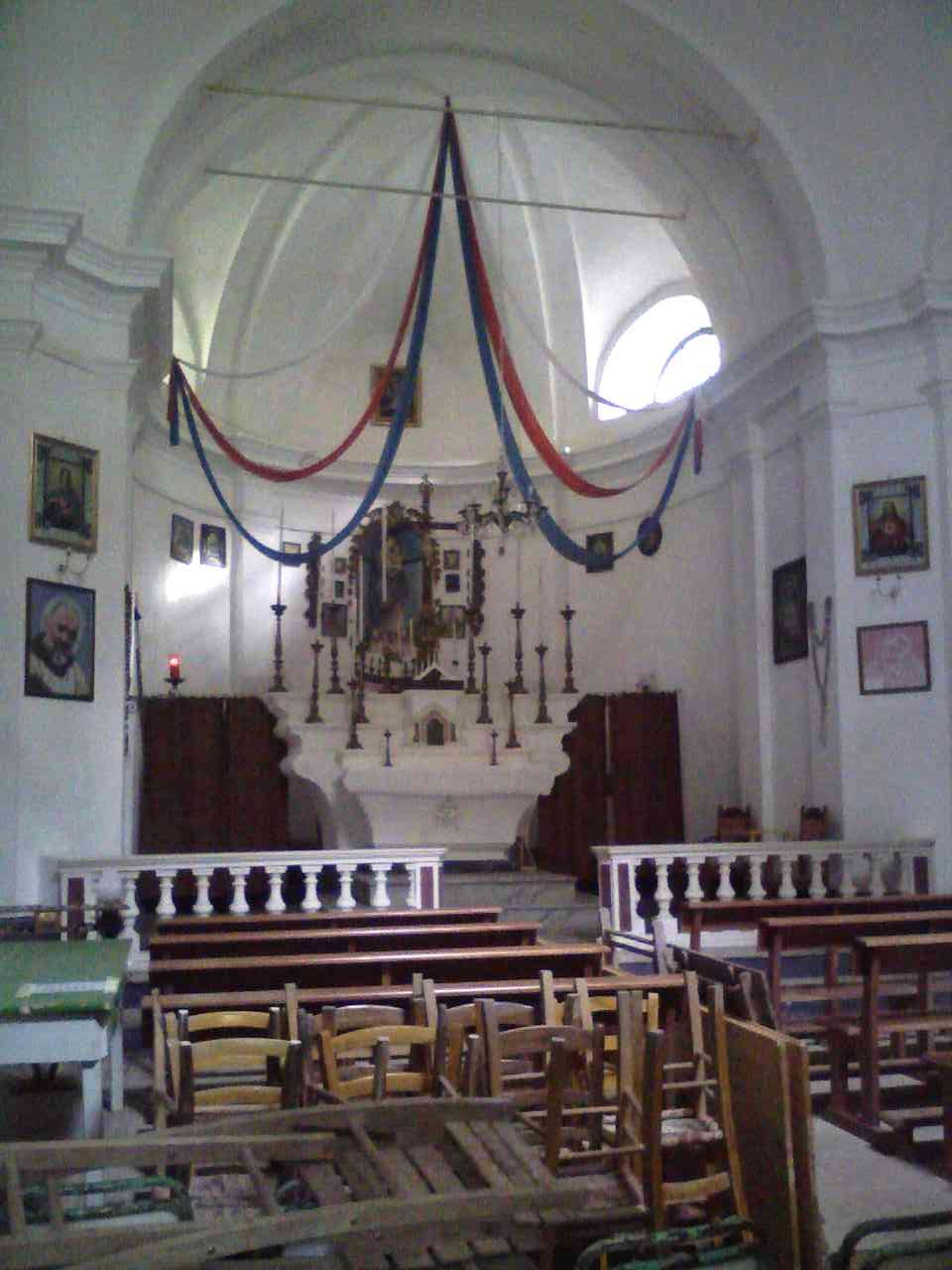 interno della cappella della Madonna del Foresto in Sassello (Italy)